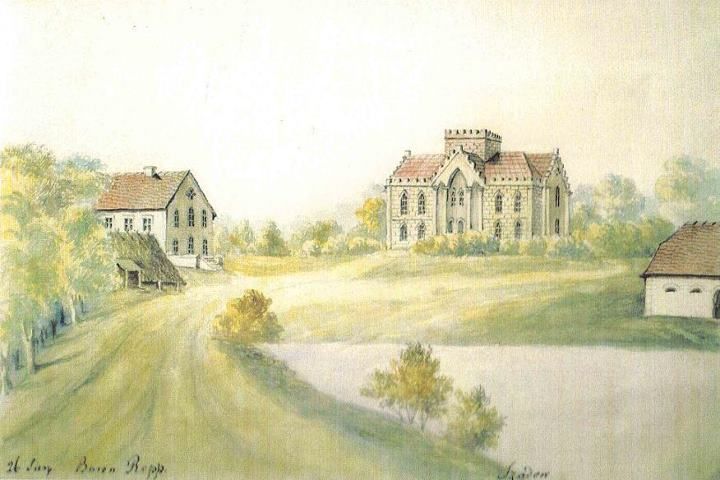 Šeduvos dvaras